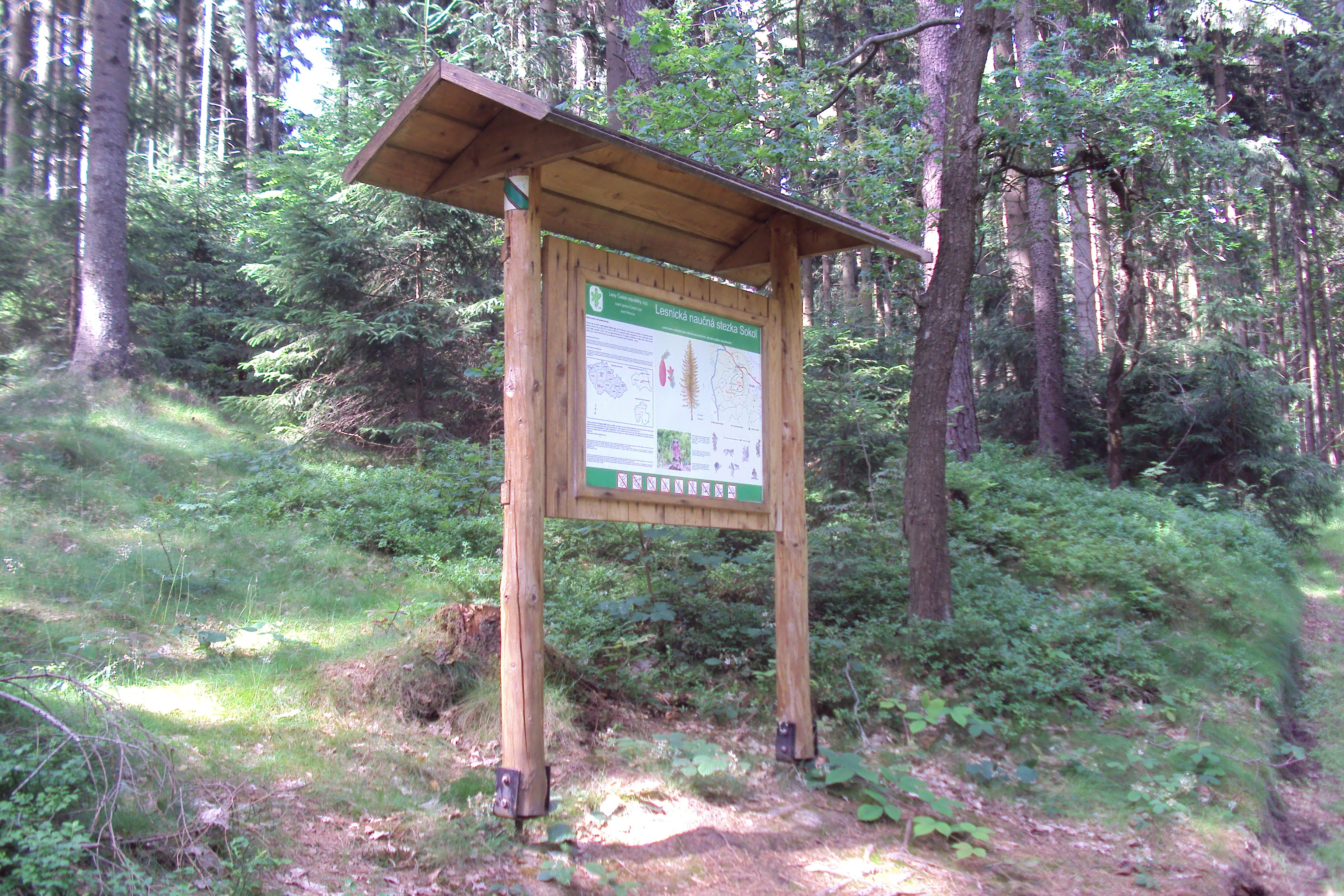 Lesnická naučná stezka na stejnojmenném kopci